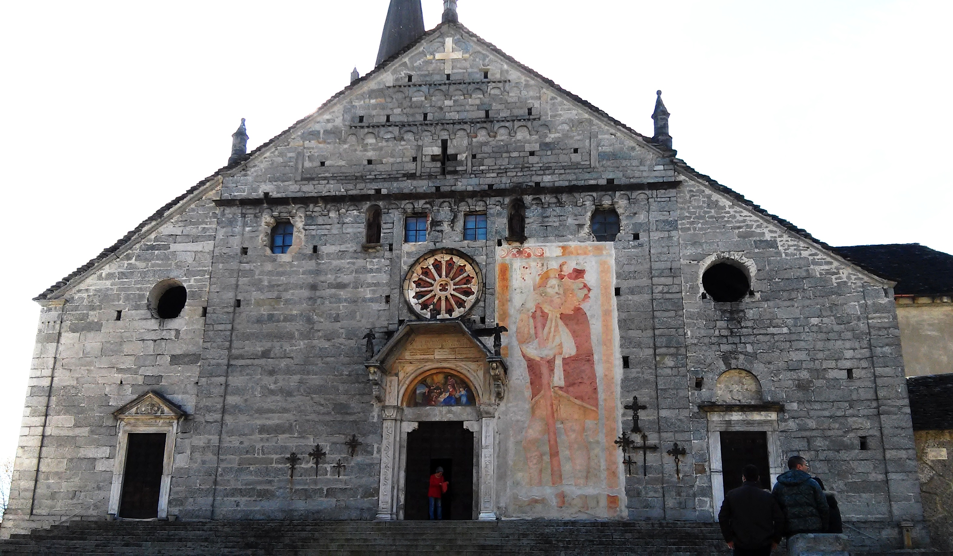 Chiesa Monumentale di San Gaudenzio This is a photo of a monument which is part of cultural heritage of Italy.